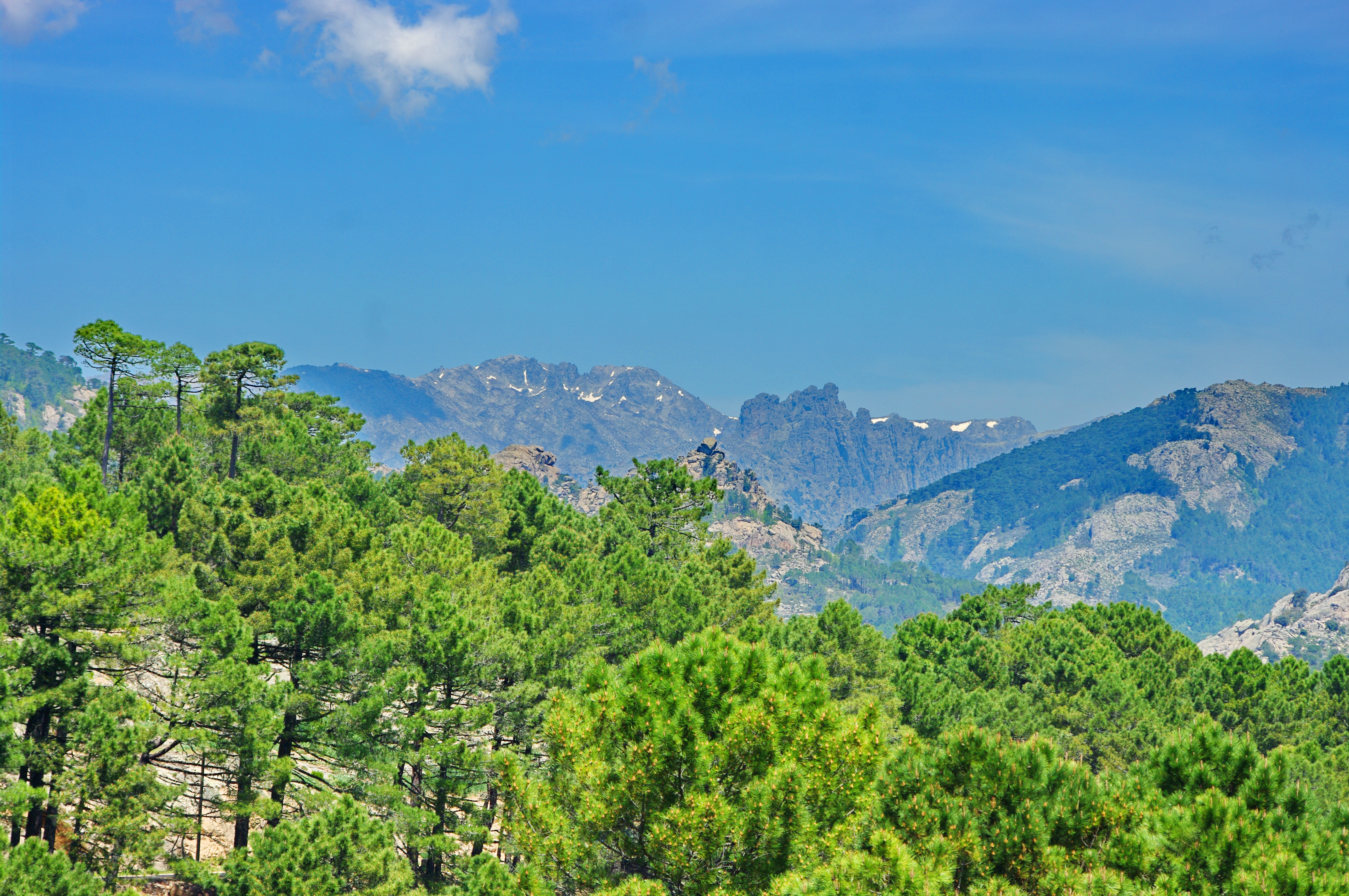 Vue du Monte Incudine et des aiguilles de Bavella depuis les environs du col d'Illarata.